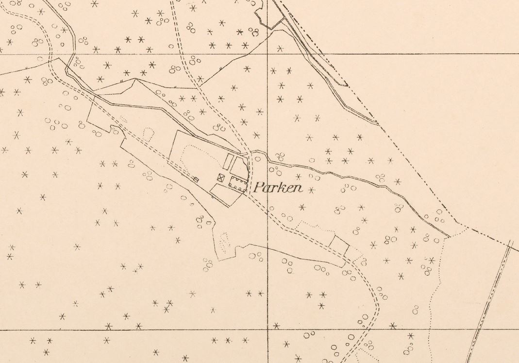 Del av 1924 års karta över Brännkyrka del 11 (Skarpnäck och Bagarmossen) visande torpet Parken